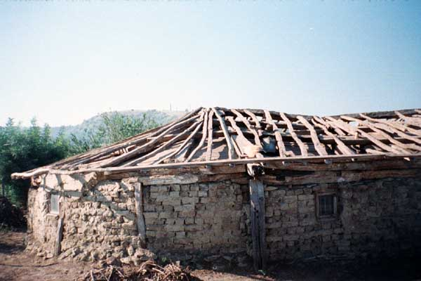 Biserica după ce s-a decopertat de lut şi de ţiglă. În timpul restaurării. Foto: Vlad Calboreanu 2001.